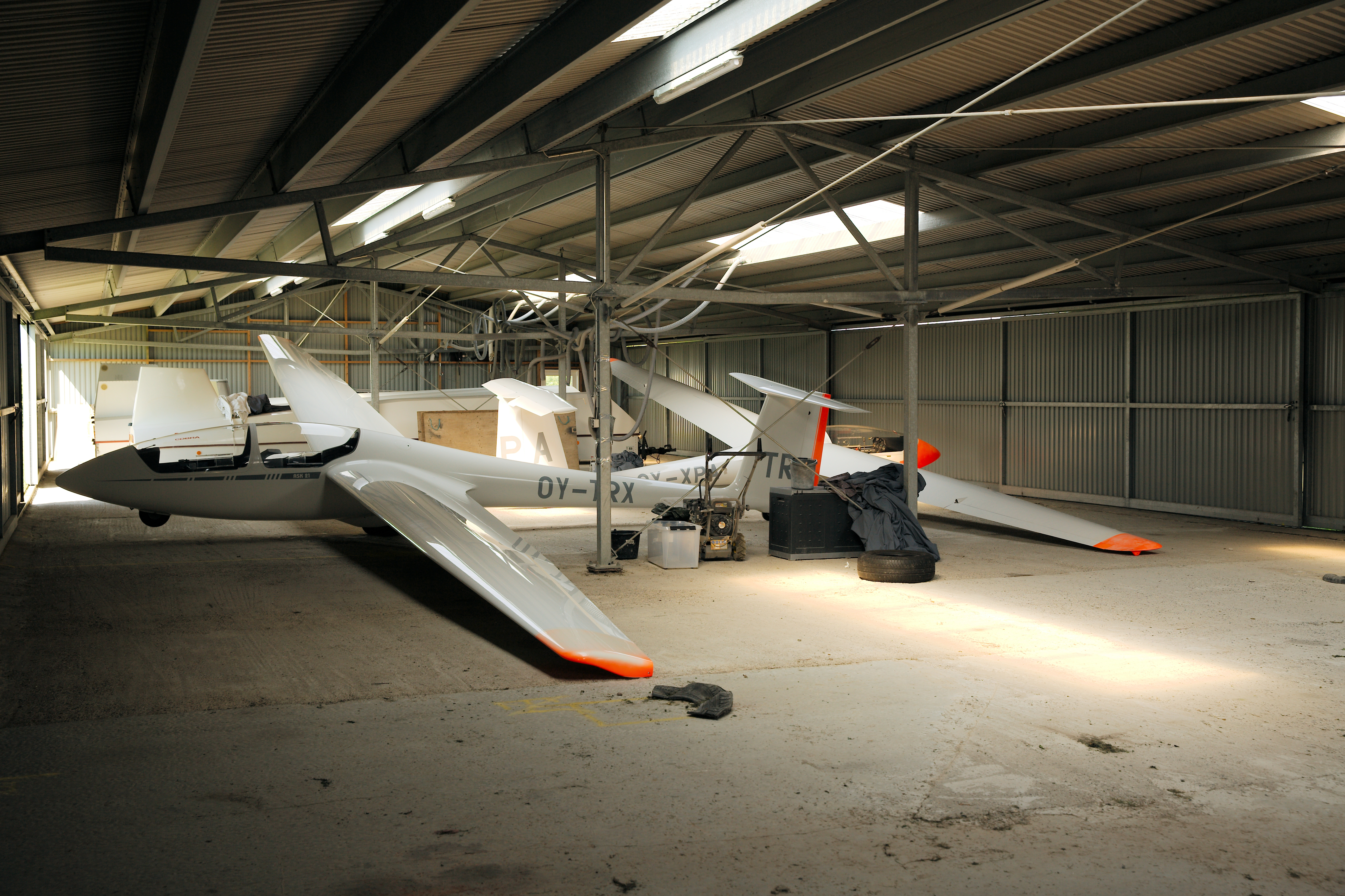 Hangar indvendig True Svæveflyveplads